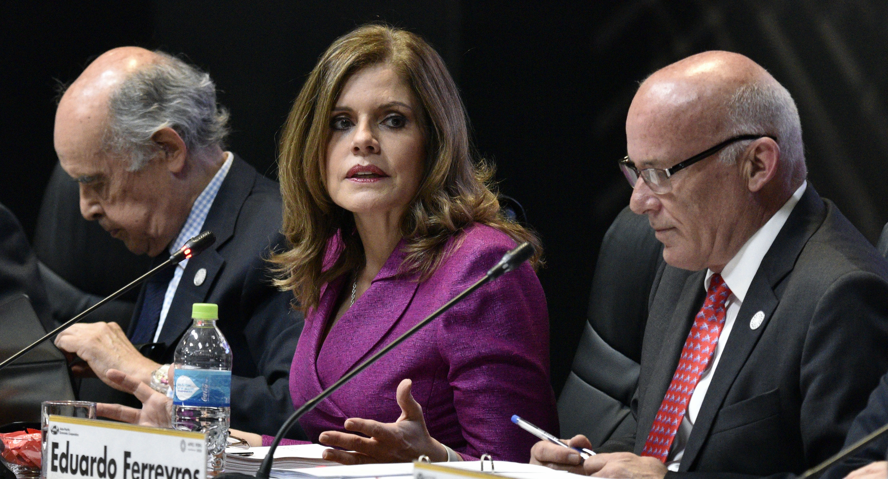 En la sede del Centro de Convenciones de Lima donde se lleva a cabo la Cumbre APEC 2016, el Ministro de Relaciones, Embajador Ricardo Luna, junto al Ministro de Comercio Exterior y Turismo, Eduardo Ferreyros, encabezaron la Reunión Ministerial Conjunta, donde participan sus homólogos de las economías de APEC.